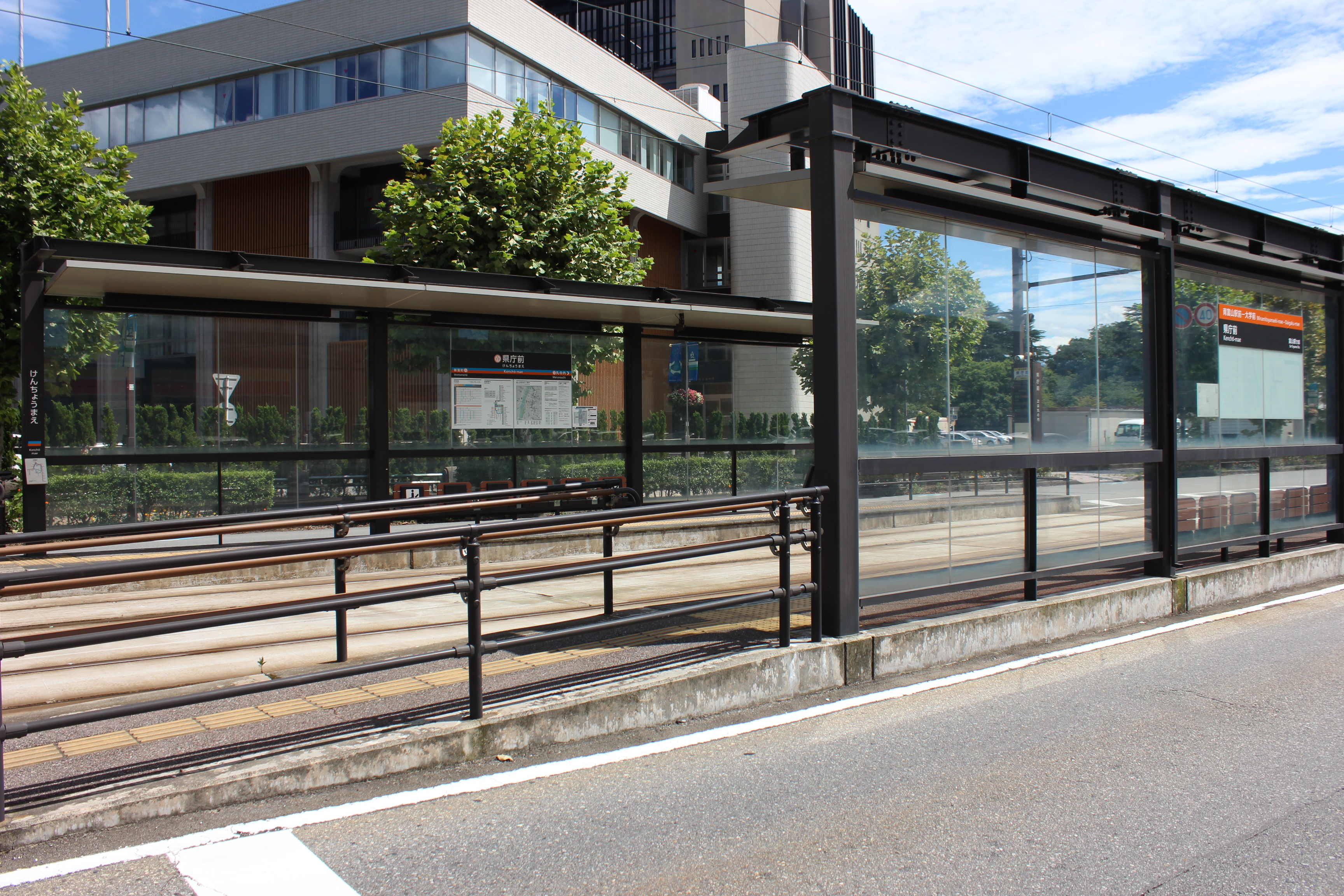 富山地方鉄道富山軌道線県庁前停留場